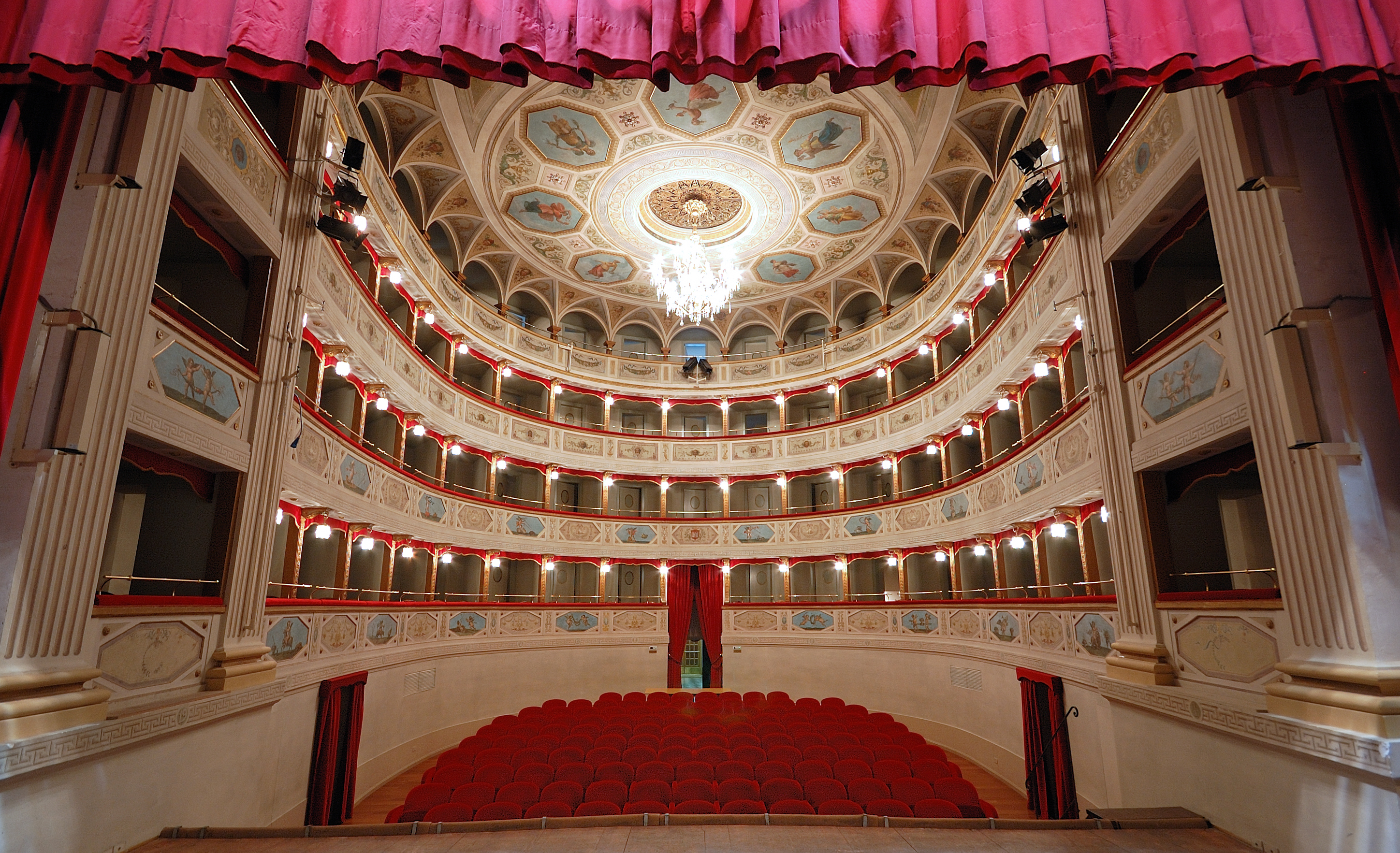 Teatro comunale Feronia This is a photo of a monument which is part of cultural heritage of Italy.